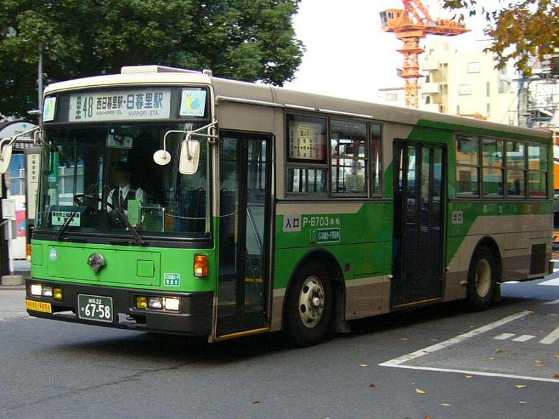 登録番号：練馬22か67-58 都営バス(Toei bus)巣鴨営業所所属 car.no P-B703 いすゞ・キュービック KC-LV380L